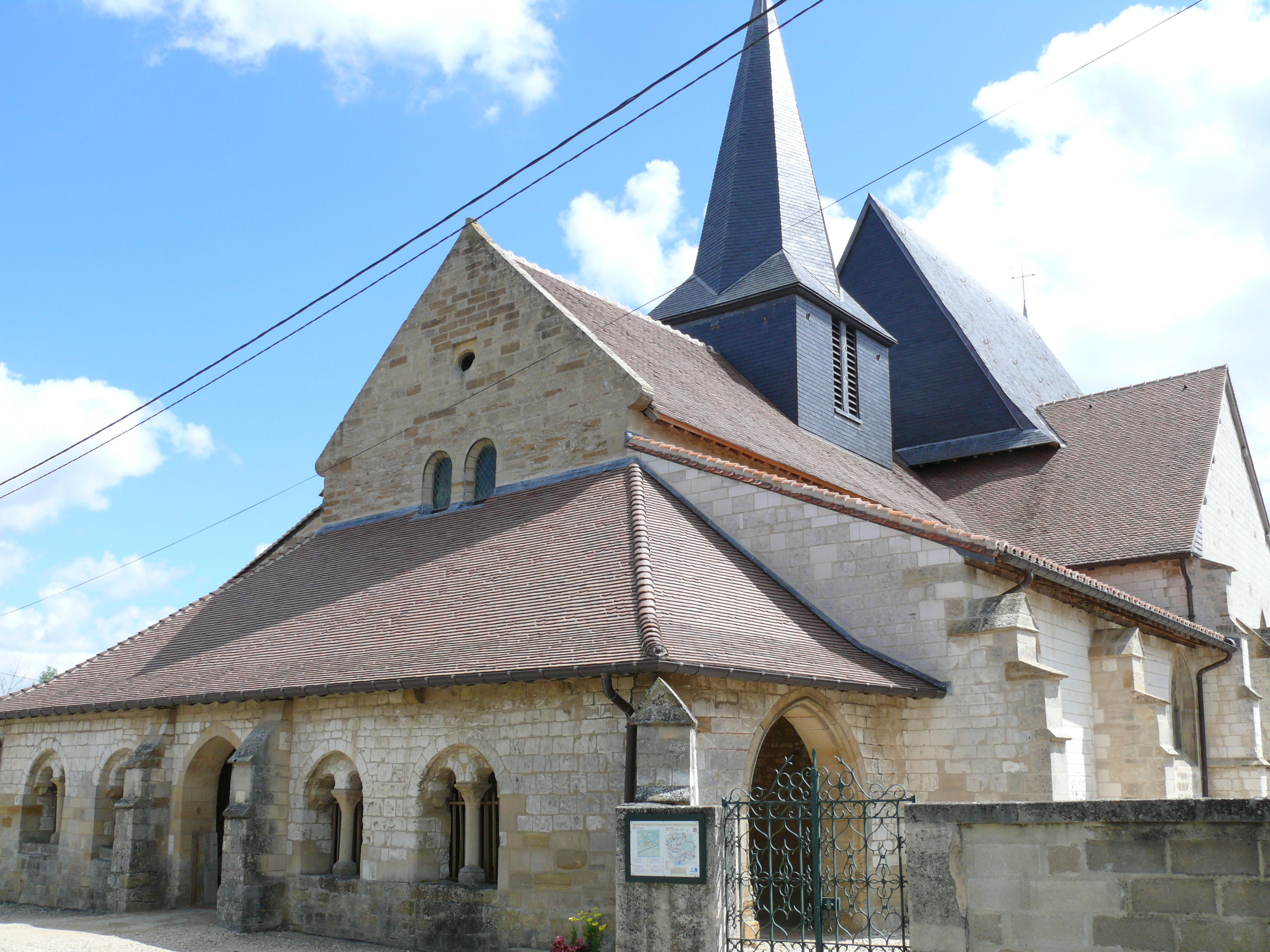 Ponthion - Eglise Saint-Symphorien